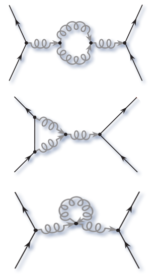 Diagrams of QCD vacuum polarization